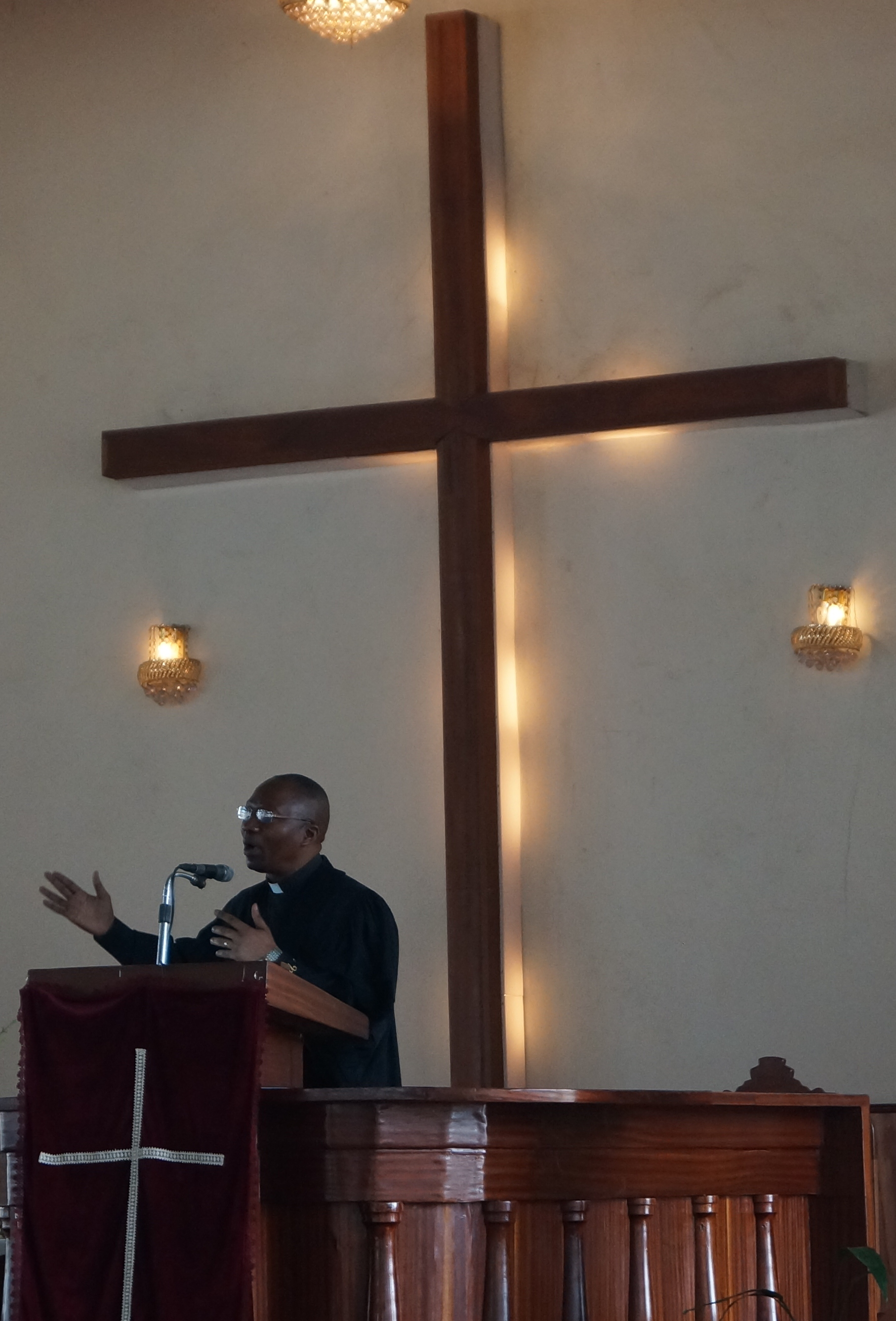 Evangeliska kyrkan i Kongo